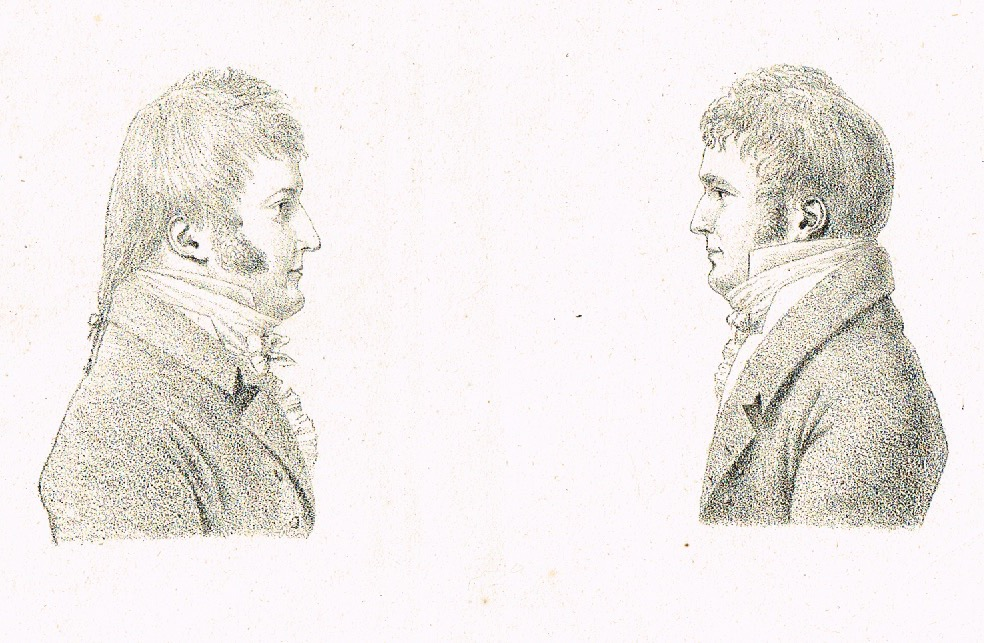 Portraits lithographiques du duc d'Orléans et du duc de Montpensier réalisés en 1805 par le duc de Montpensier